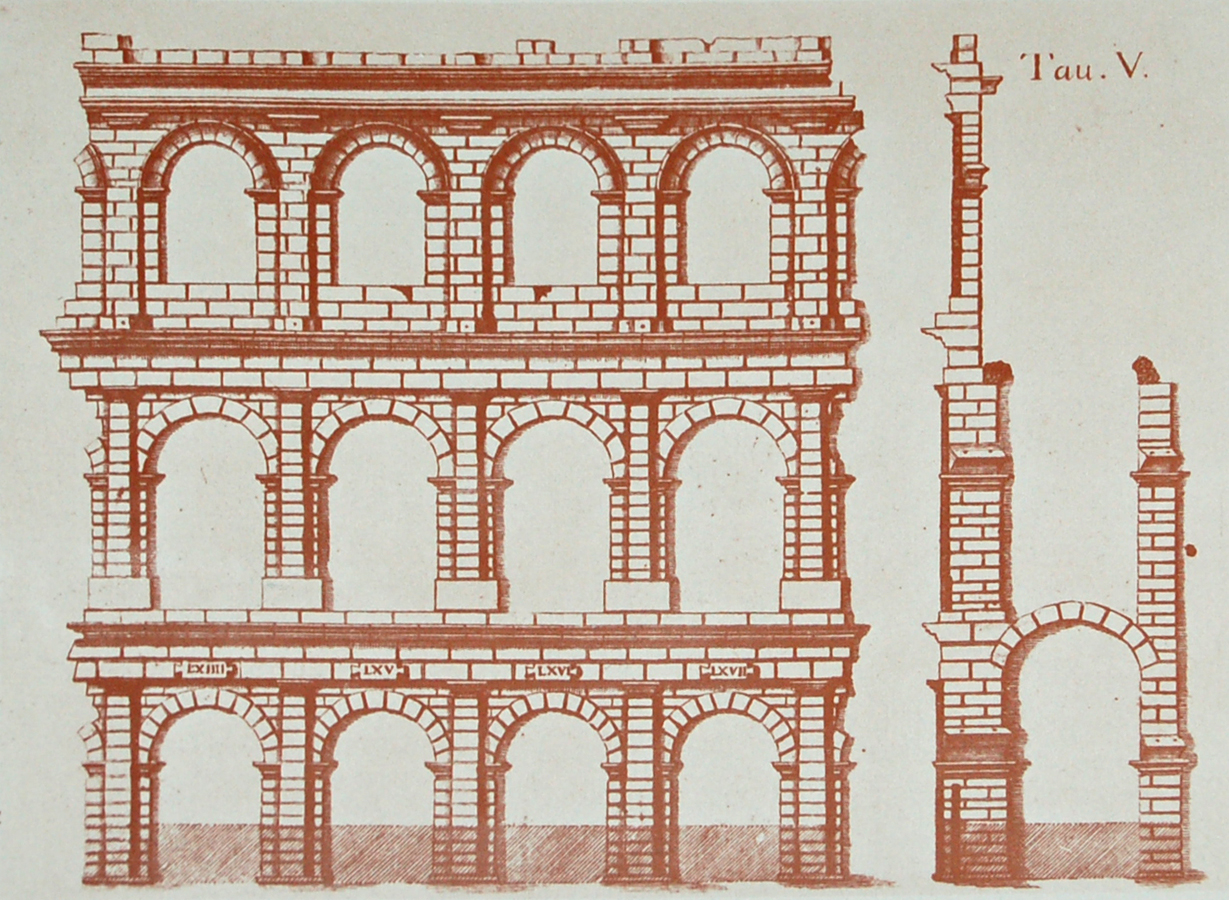 Disegno dell'ala dell'Arena di Verona in un'incisione di Scipione Maffei.